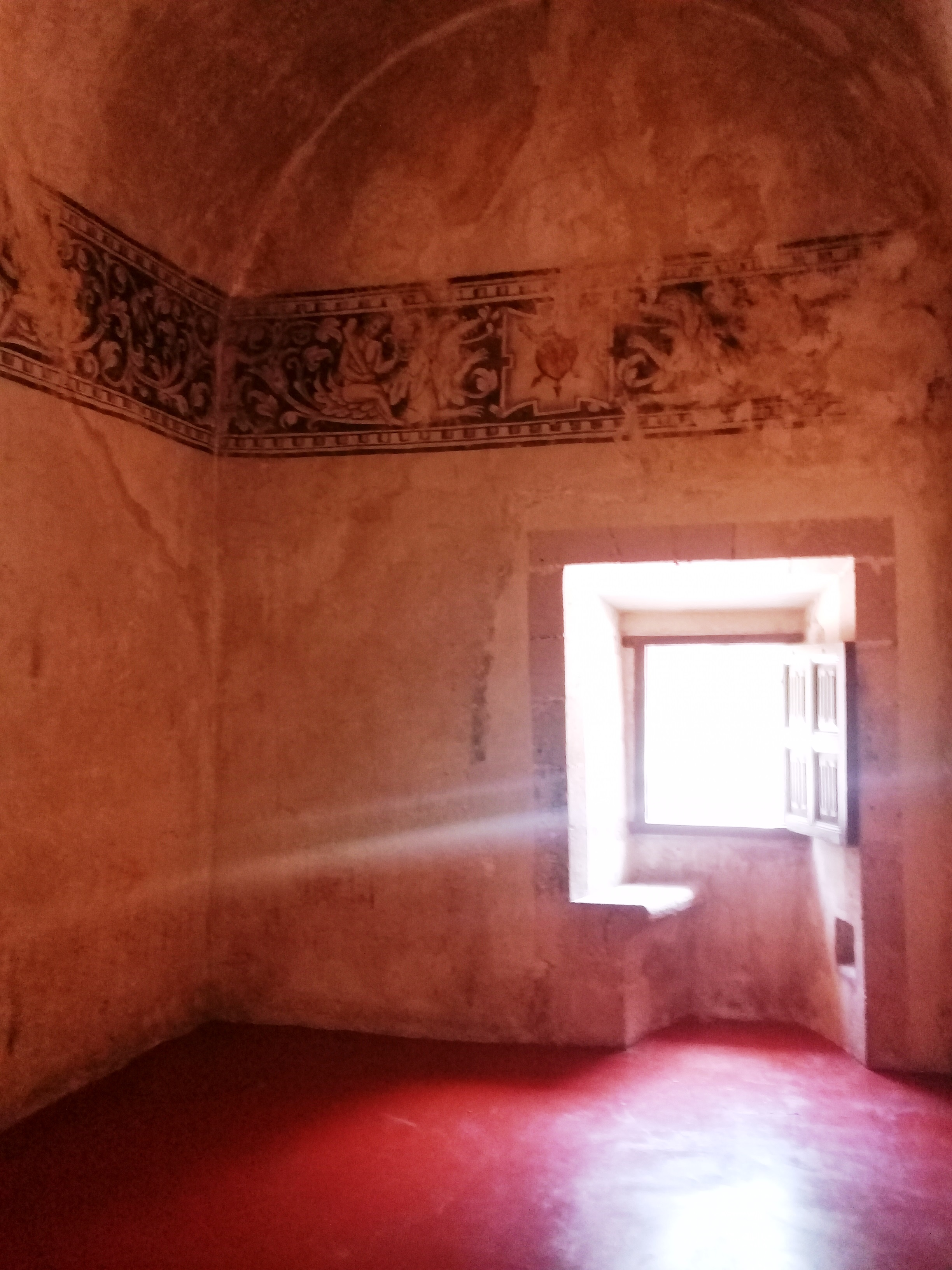 Templo y exconvento de San Nicolás de Tolentino (Actopan).